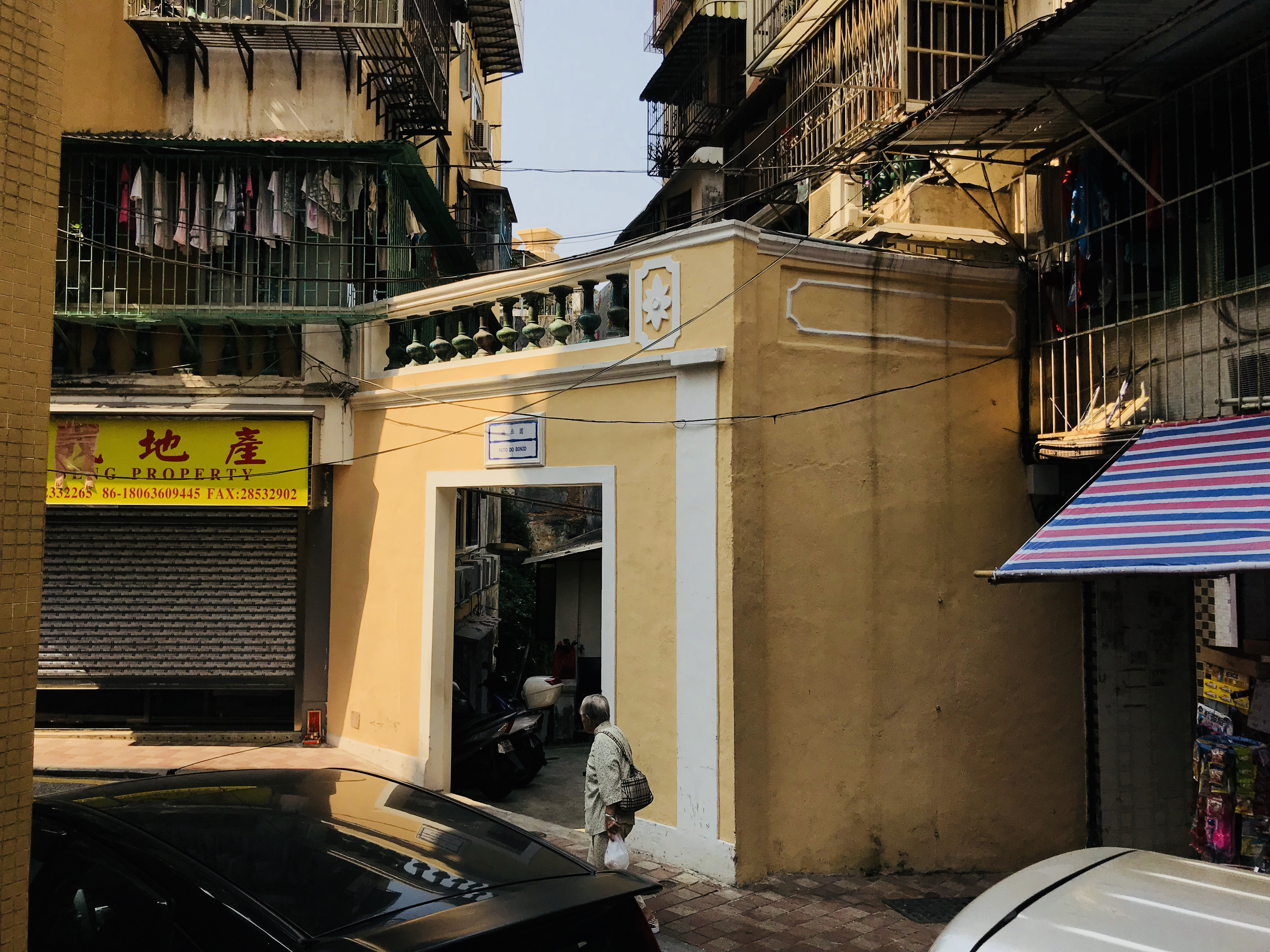 中文（台灣）: 南巫圍入口